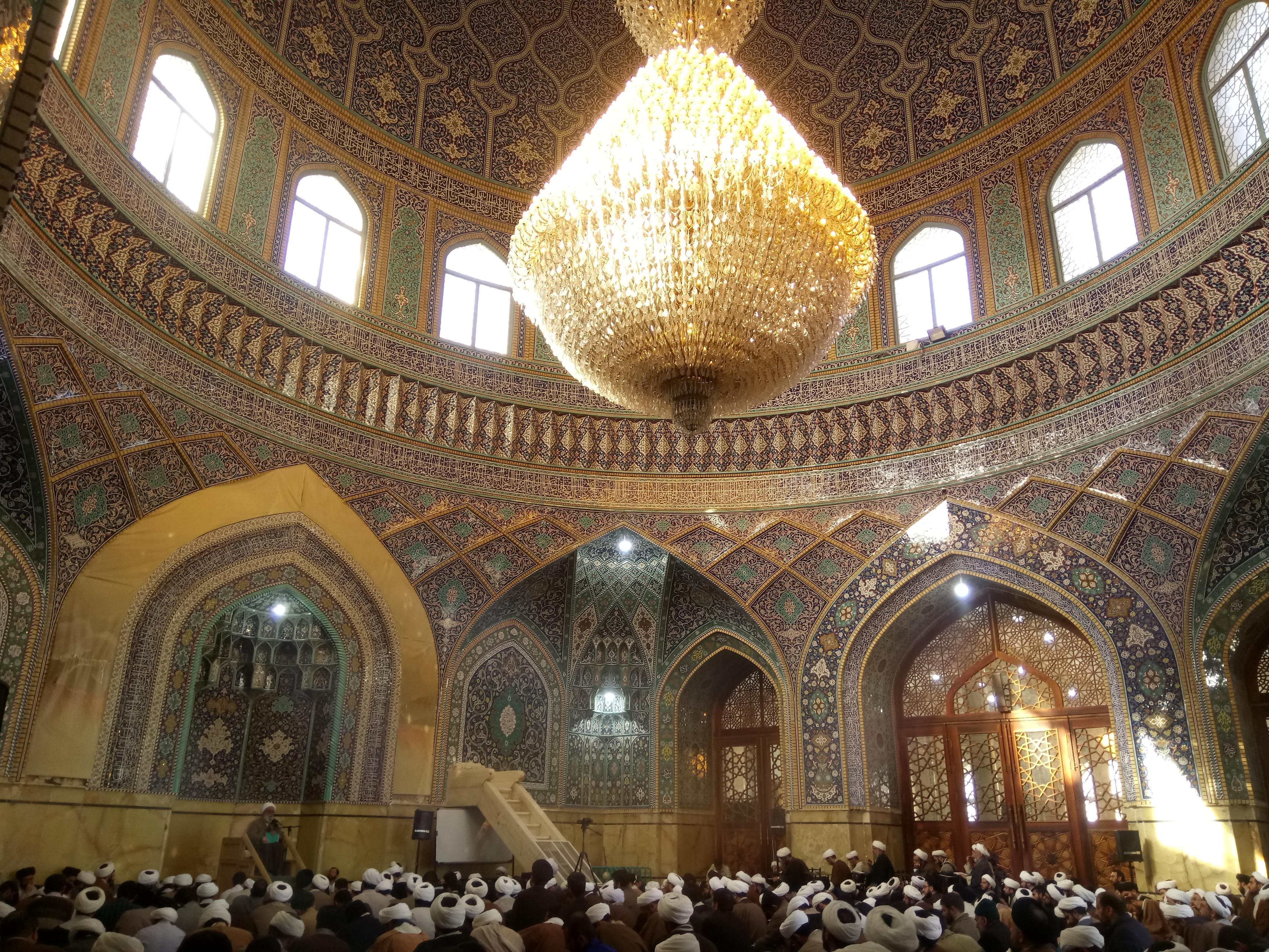 درس خارج فقه در مسجد اعظم قم Lesson Session